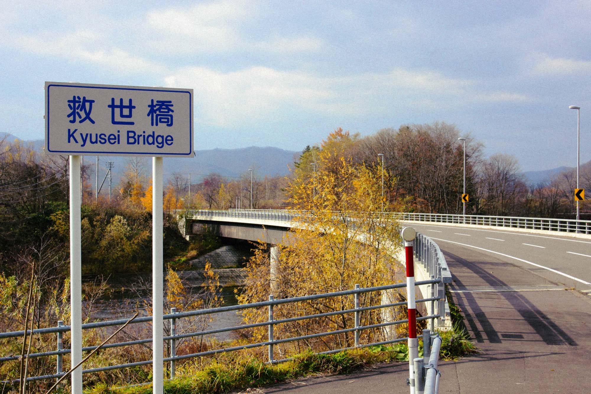 北海道道711号救世橋